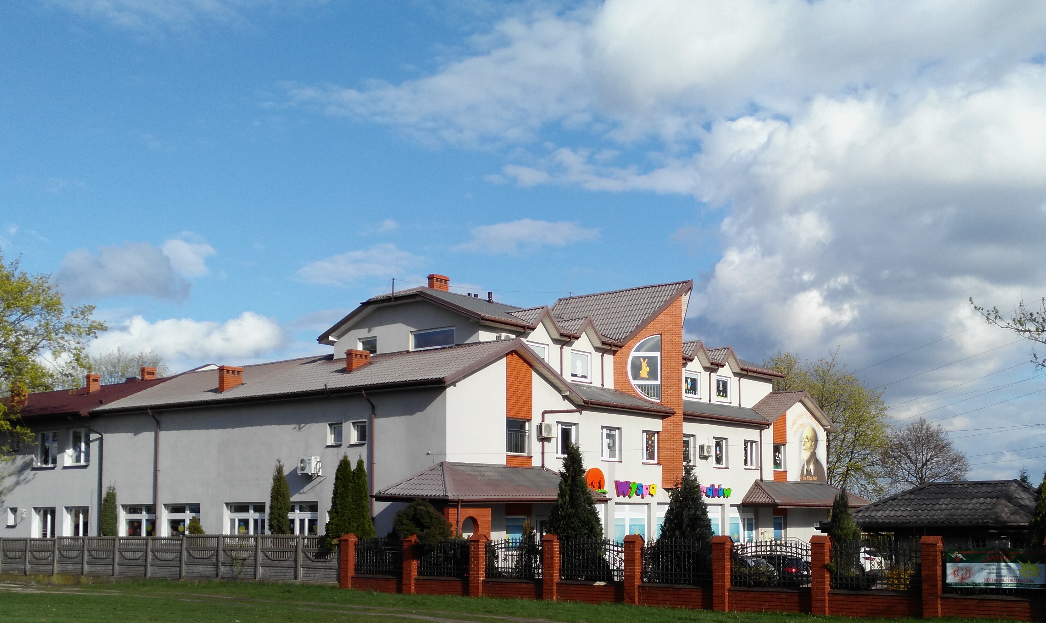 Katolickie przedszkole "Wyspa Skarbów" im.Św.Filipa Neri w Tomaszowie. W PRL restauracja "Baśniowa", w latach dziewięćdziesiatych XX w. szwalnia.